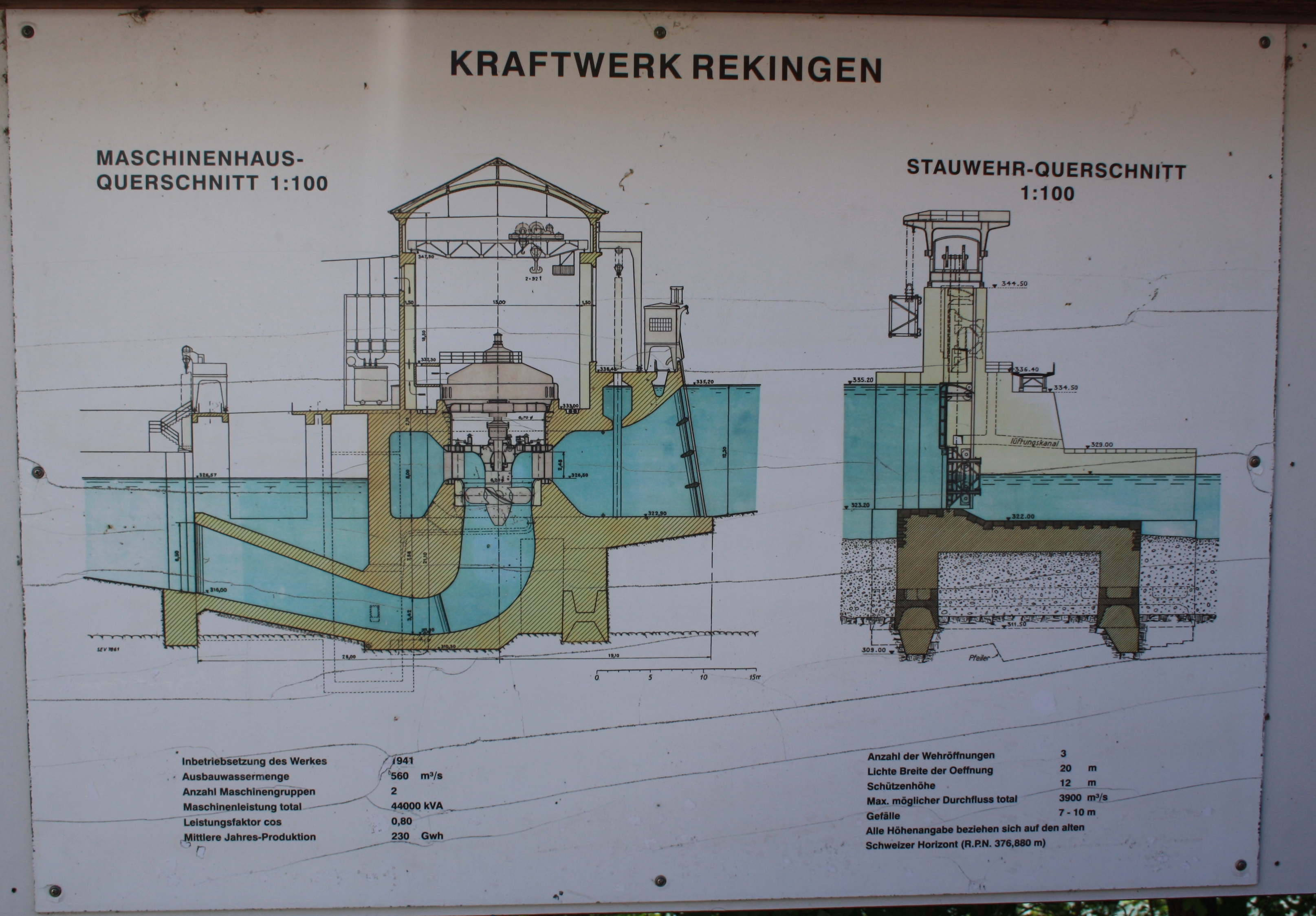 Kraftwerk Reckingen